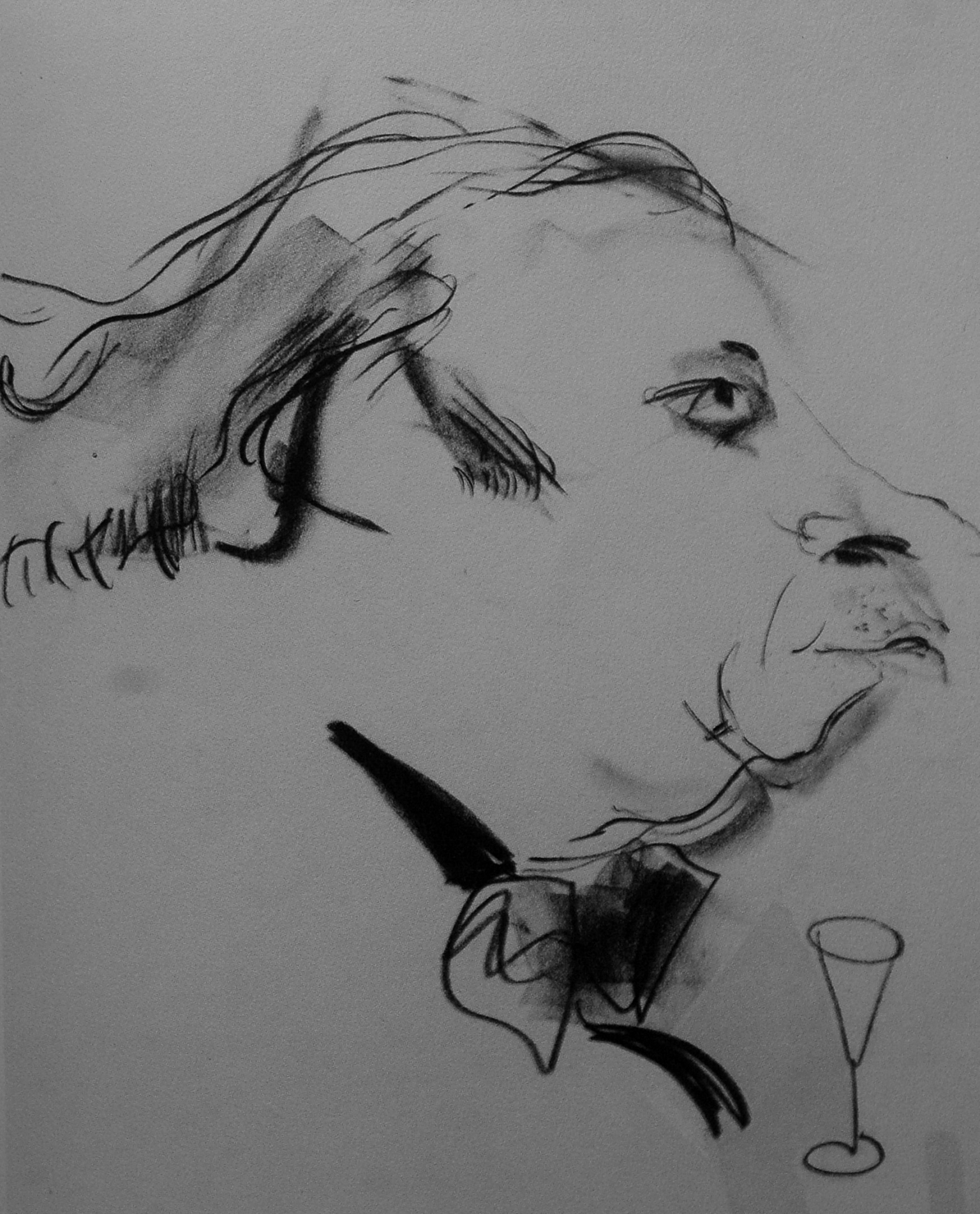 Martin Åberg. Karikatyrteckning av konstnärsvänner utförd av konstnären John Jon-And, utgiven postumt efter hans död 1941 i boken Konstnärer Gebers Förlag.